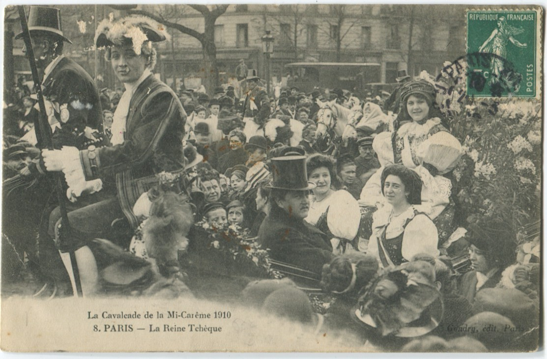 Le char de la reine tchèque Ruzena Brazova venue à Paris participer aux fêtes du jeudi de la Mi-Carême 1910.